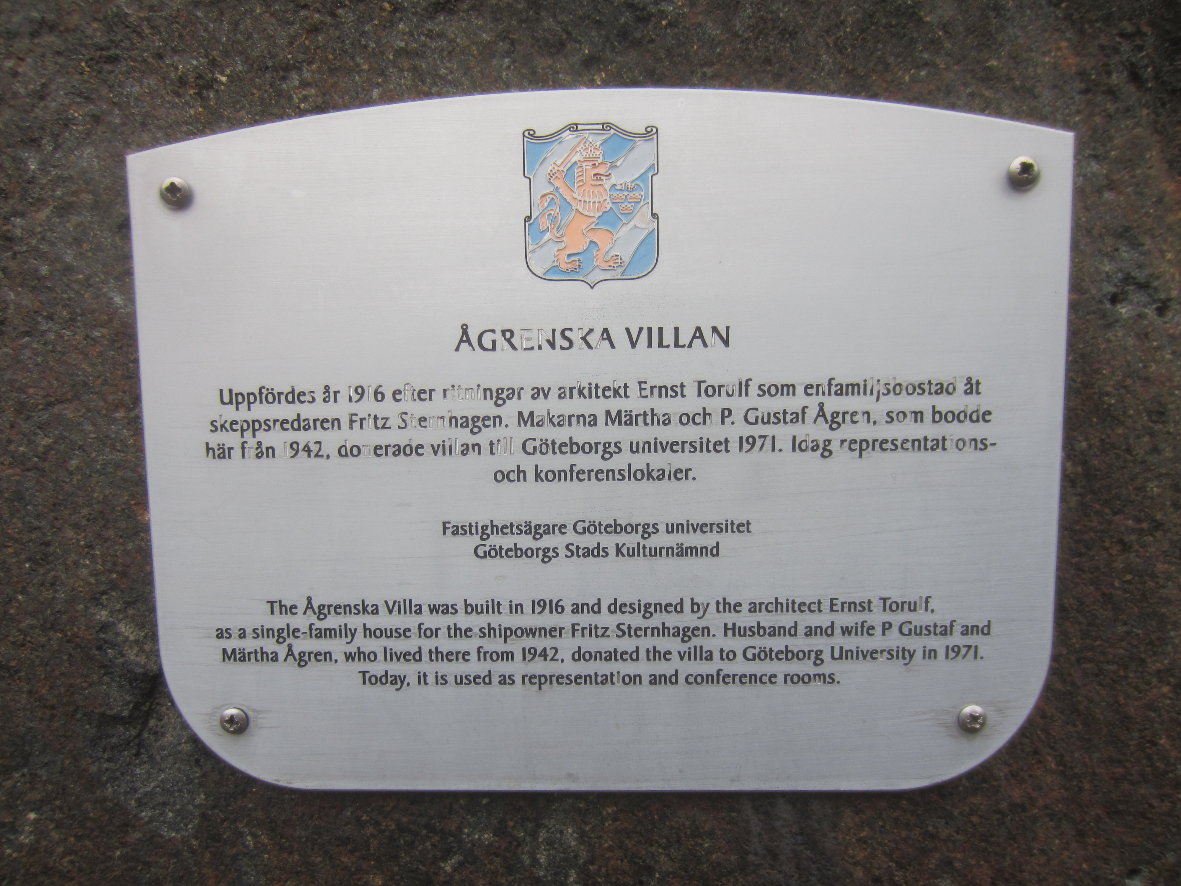 Plakett vid Ågrenska villan, Lorensbergs villastad i Göteborg. Plaketten sattes upp som en del av Göteborgs stads kulturnämnds "Projekt Husmärkning" kring åren 2000-2001 där drygt hundra skyltar ingick. Se även boken "100 utmärkta hus i Göteborg". Vid en inventering av kommunen gjord 2016 satt 69 skyltar fortfarande uppe.